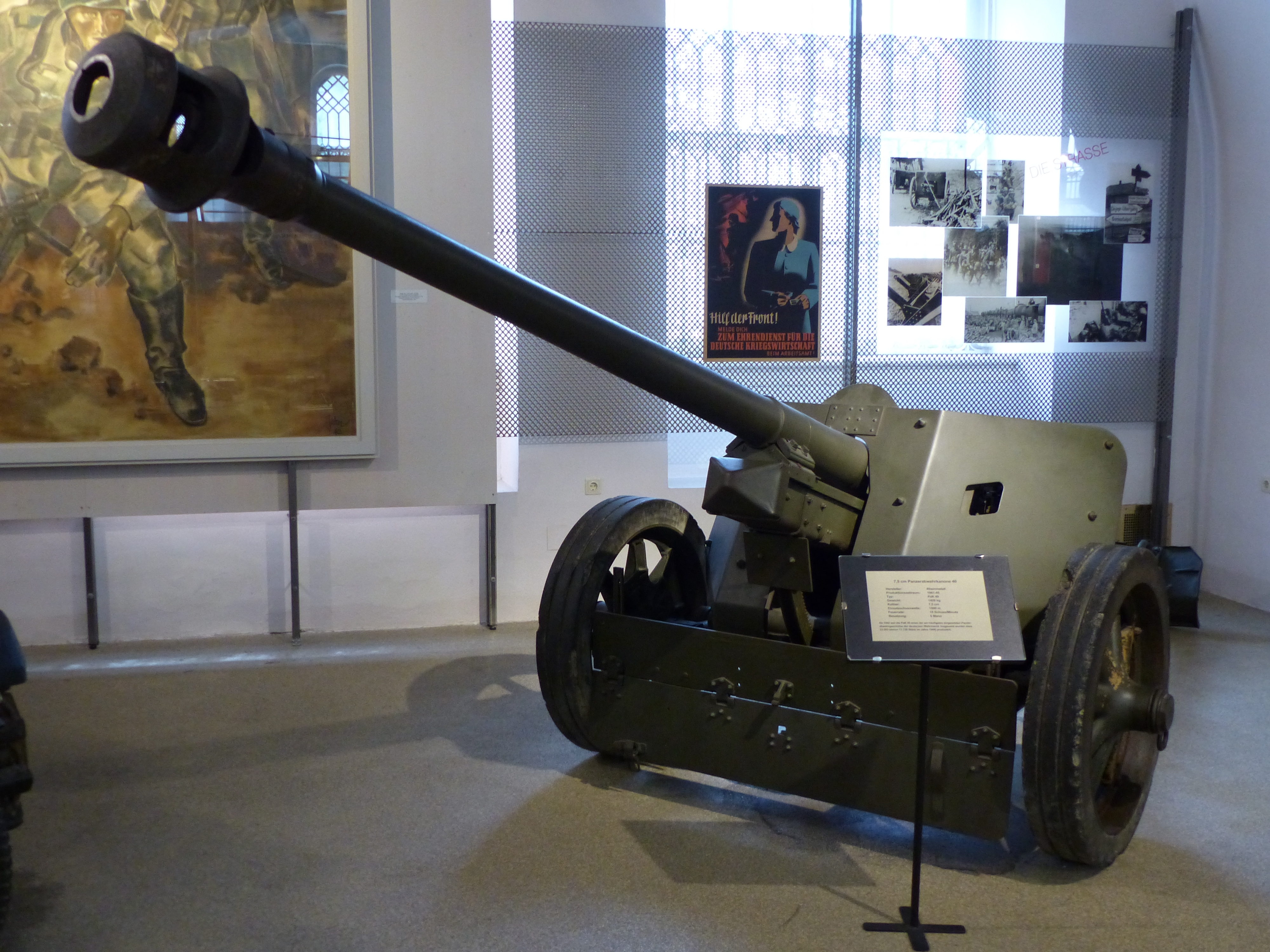 Heeresgeschichtliches Museum Wien 7,5cm PaK 40